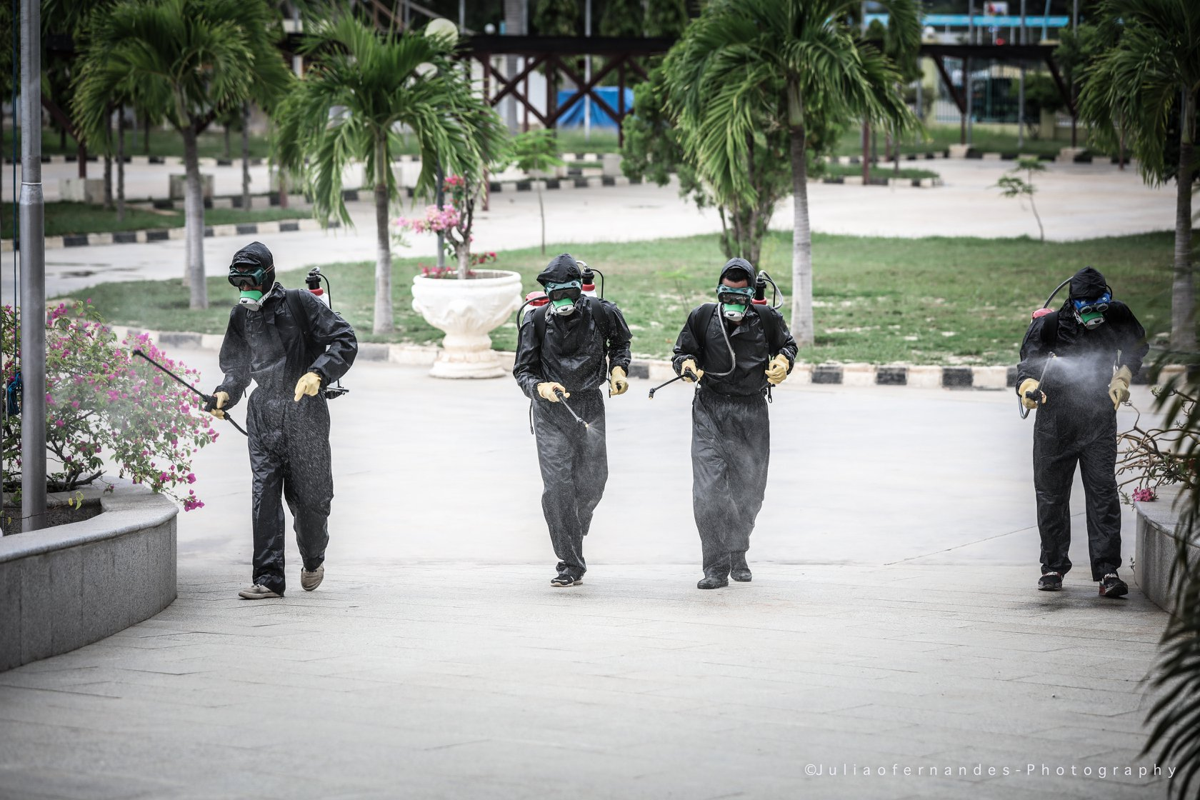 Präventionsmaßnahmen am Präsidentenpalast Osttimors